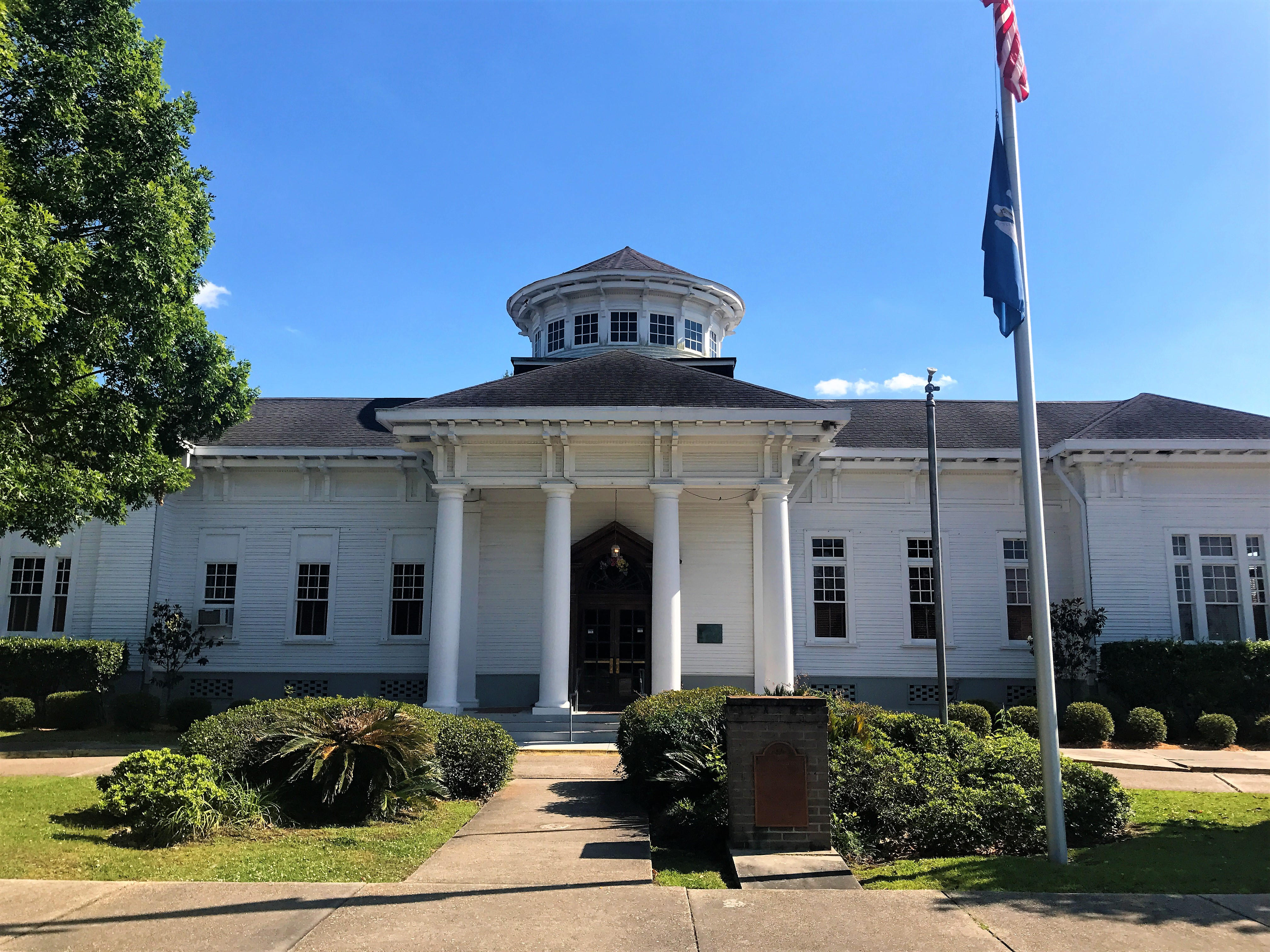 City Hall in Bogalusa, Louisiana.